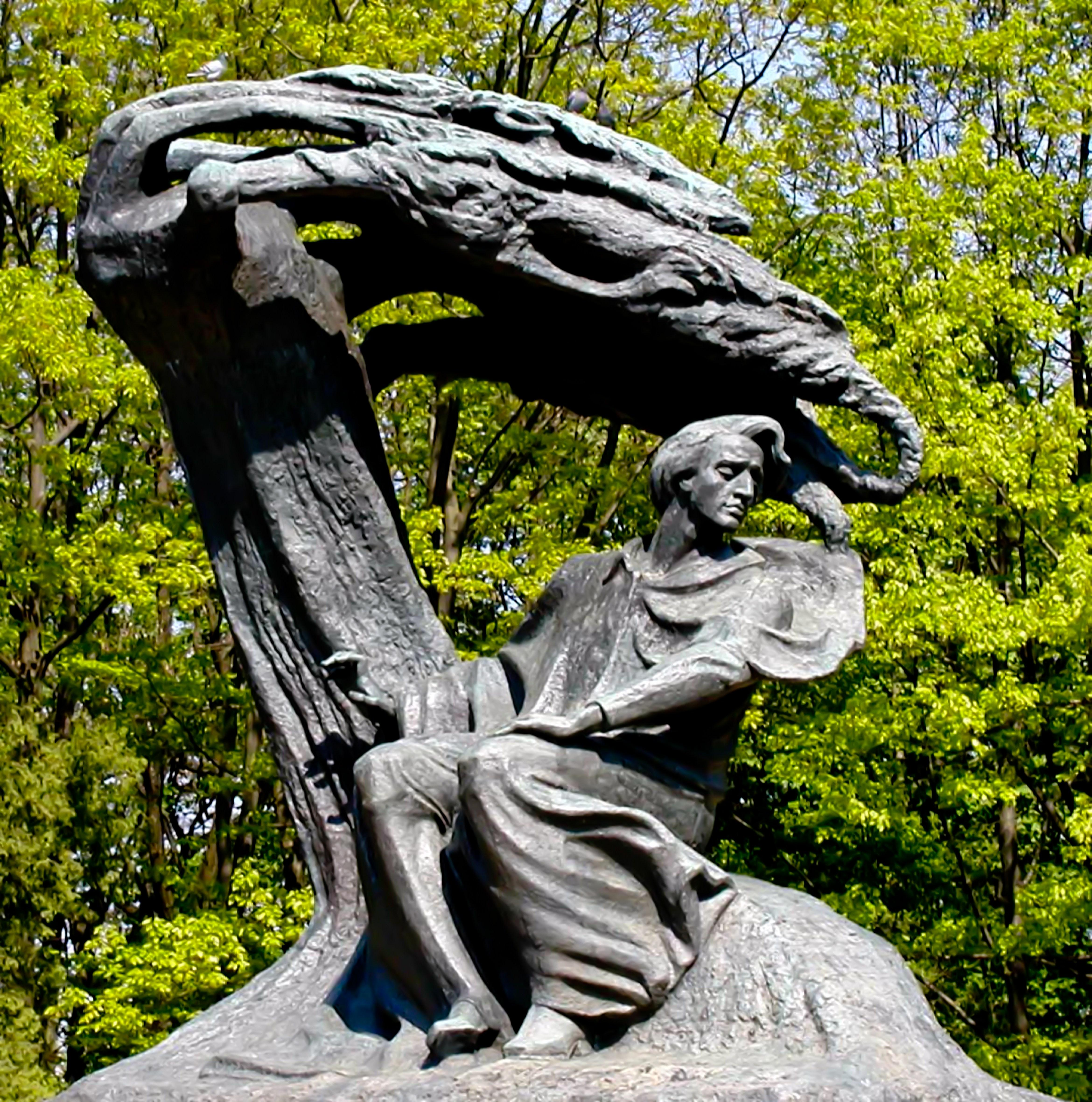 Pomnik Fryderyka Chopina w Łazienkach